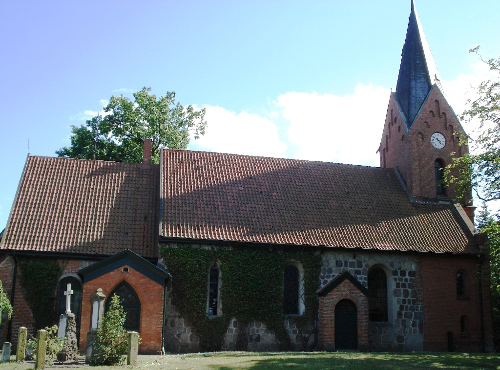 Die Maria-Magdalenen-Kirche in Malente